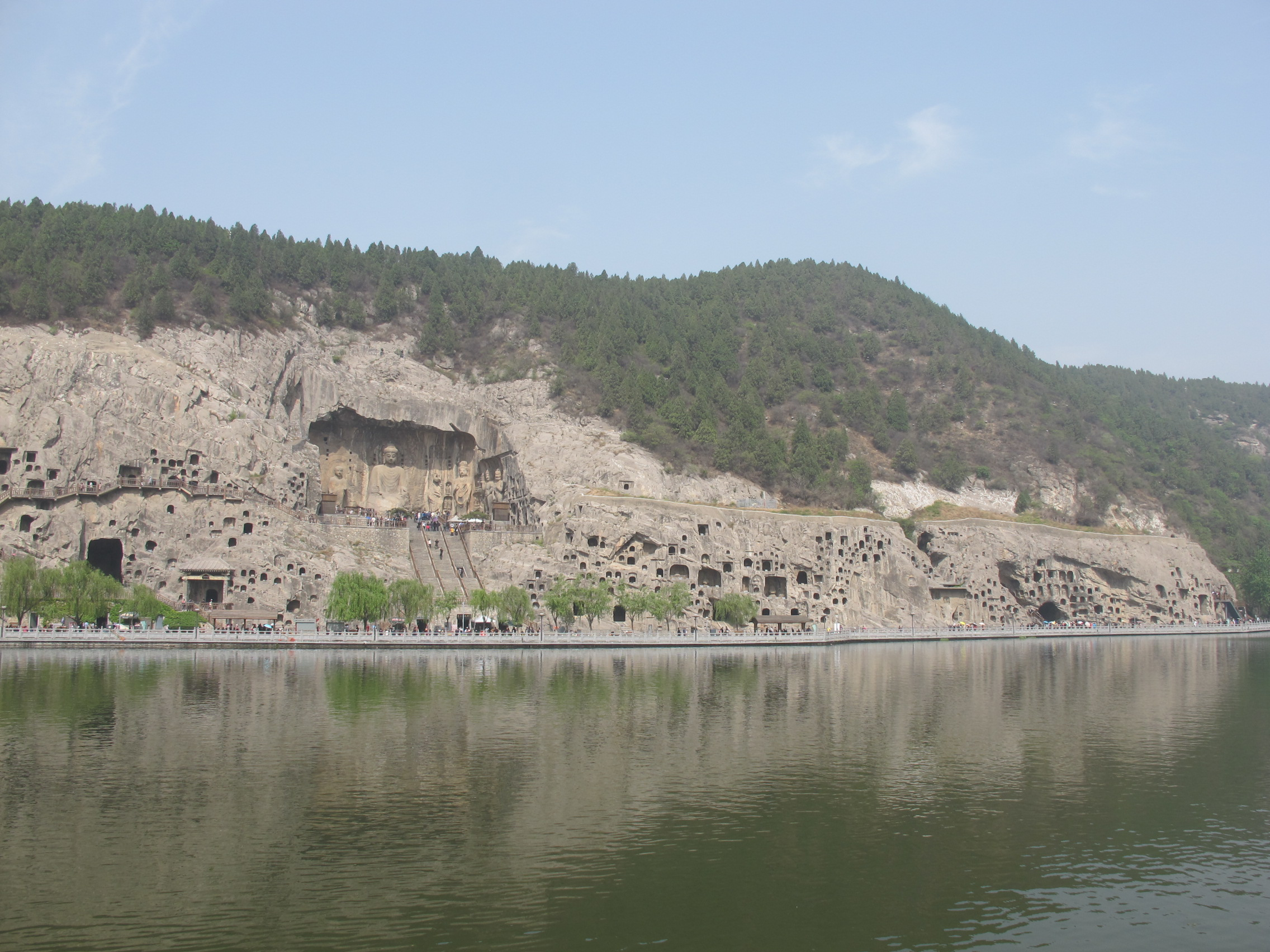 伊水东岸看西山石窟